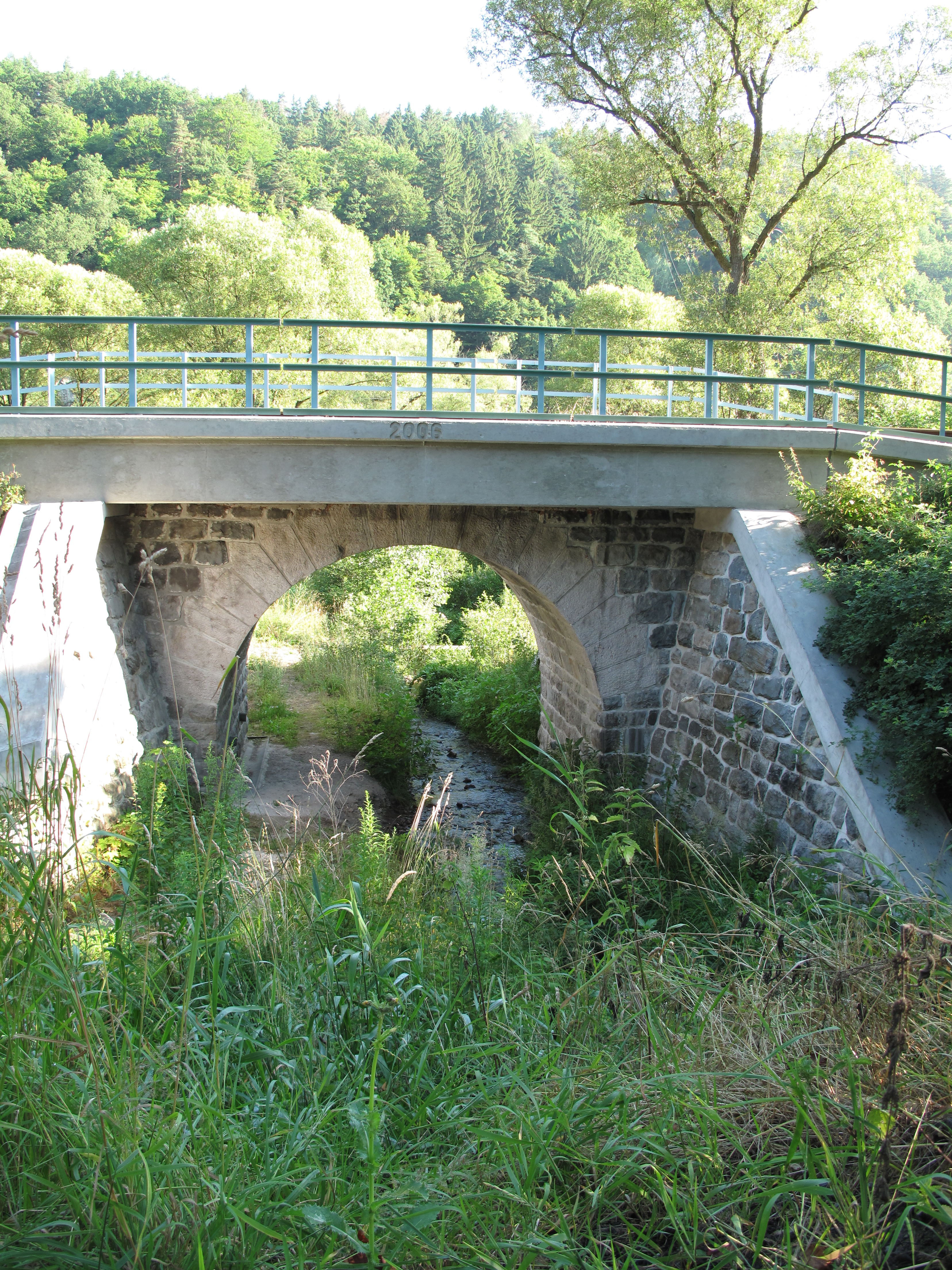 Nadjezd železniční tratě Čerčany – Světlá nad Sázavou nad Vodslivským potokem v Růženíně, okres Benešov.